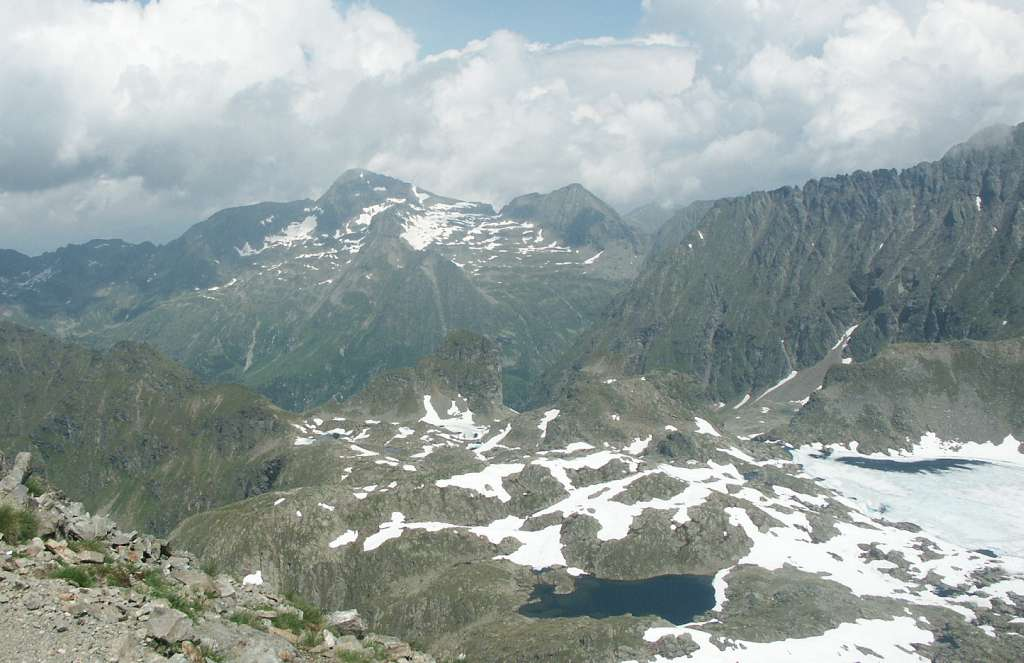 Hochwildstelle / Schladminger Tauern / unten Großer Klafferkessel Hochwildstelle gesehen vom Greifenberg Aufgenommen von Benutzer:Tigerente am 22. Juli 2004